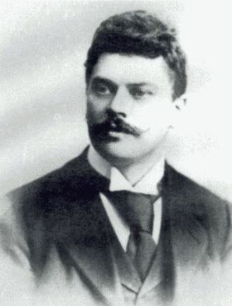 Willem Molenbrtoek, architecte de la Witte Huis à Rotterdam.